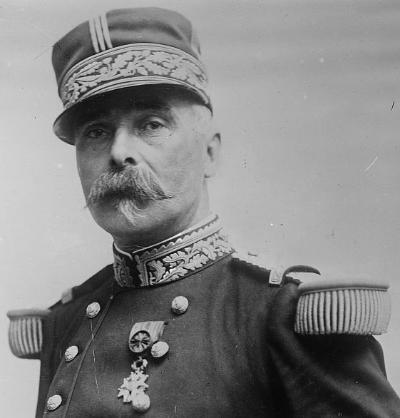 French general Paul Pau (1848-1932)